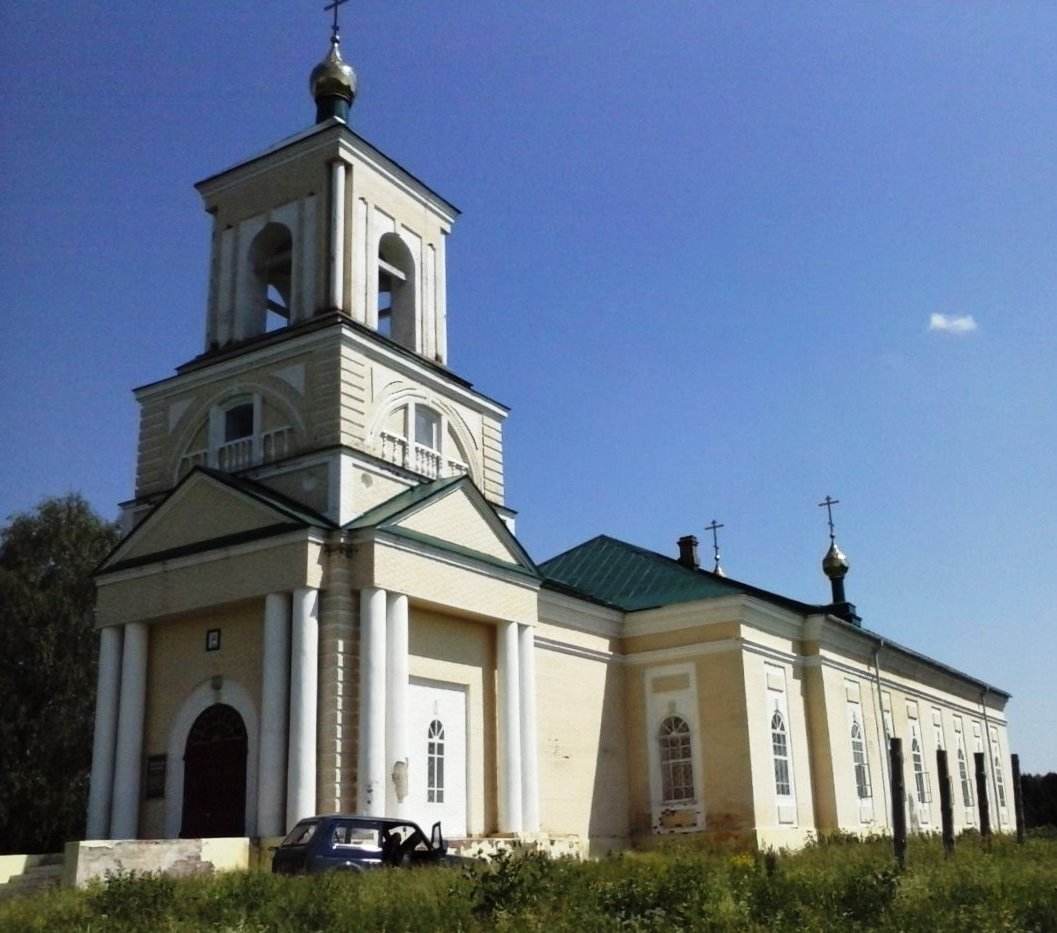 Церковь Спаса Нерукотворного в селе Укан, Ярский район Удмуртии